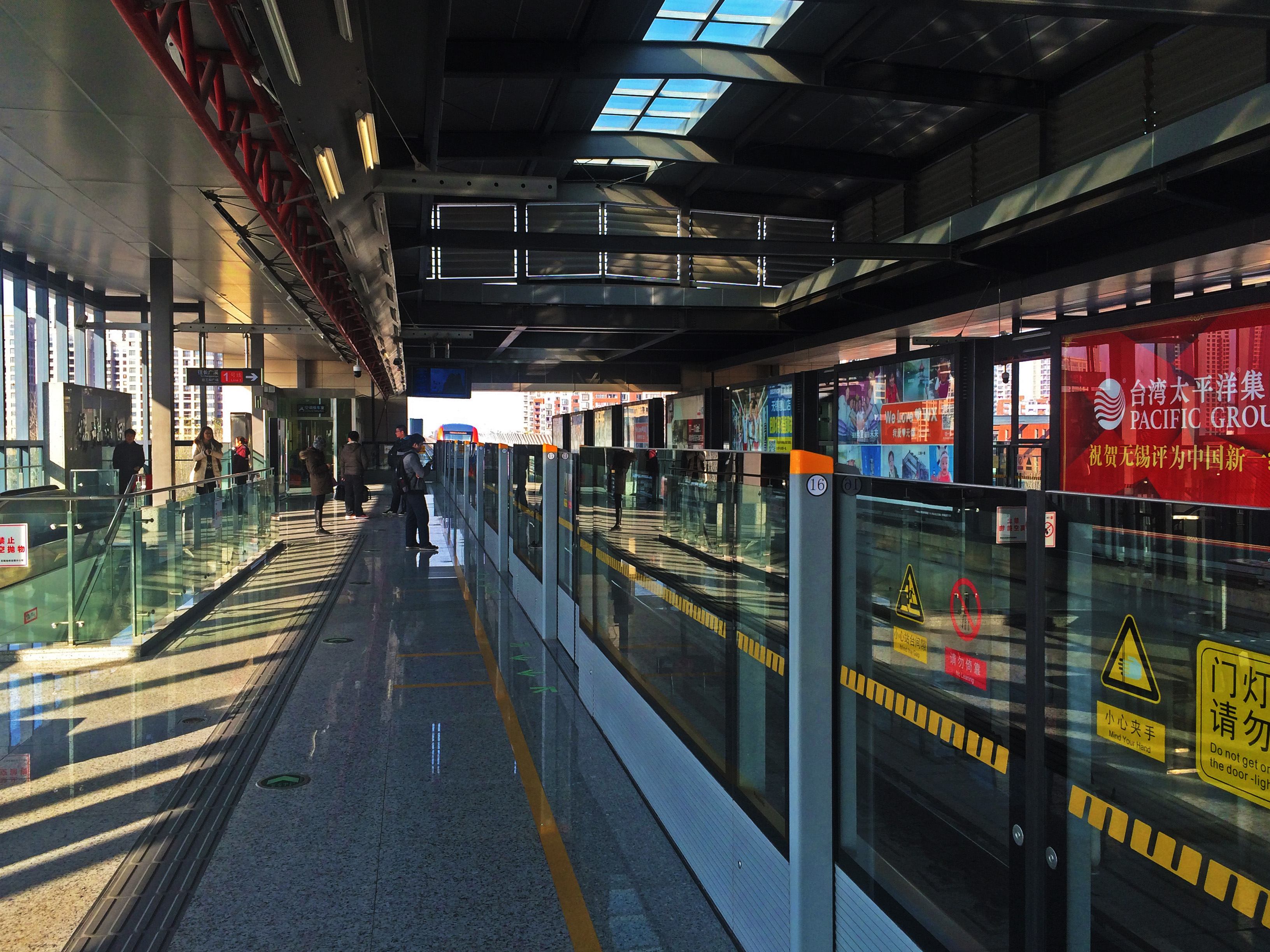 無錫地鐵1號線錫北運河站站臺